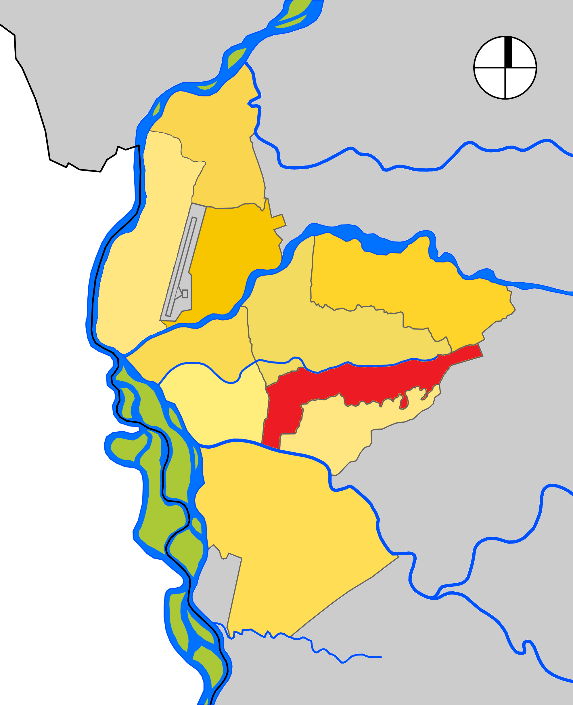 Mapa de las Comuna 7 de Neiva, departamento del Huila, Colombia.